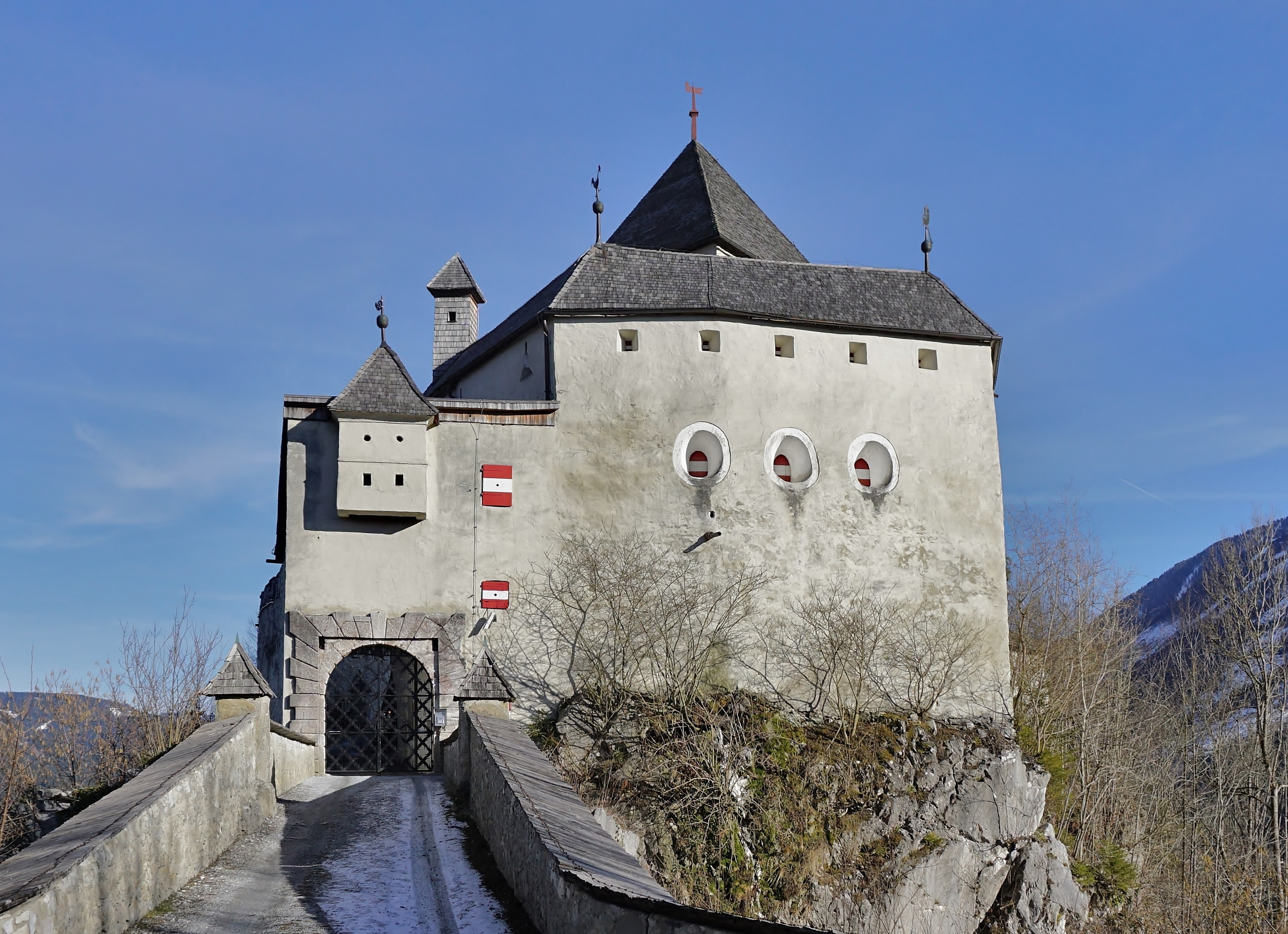 Burg Strechau, Bastei mit dem Burgtor